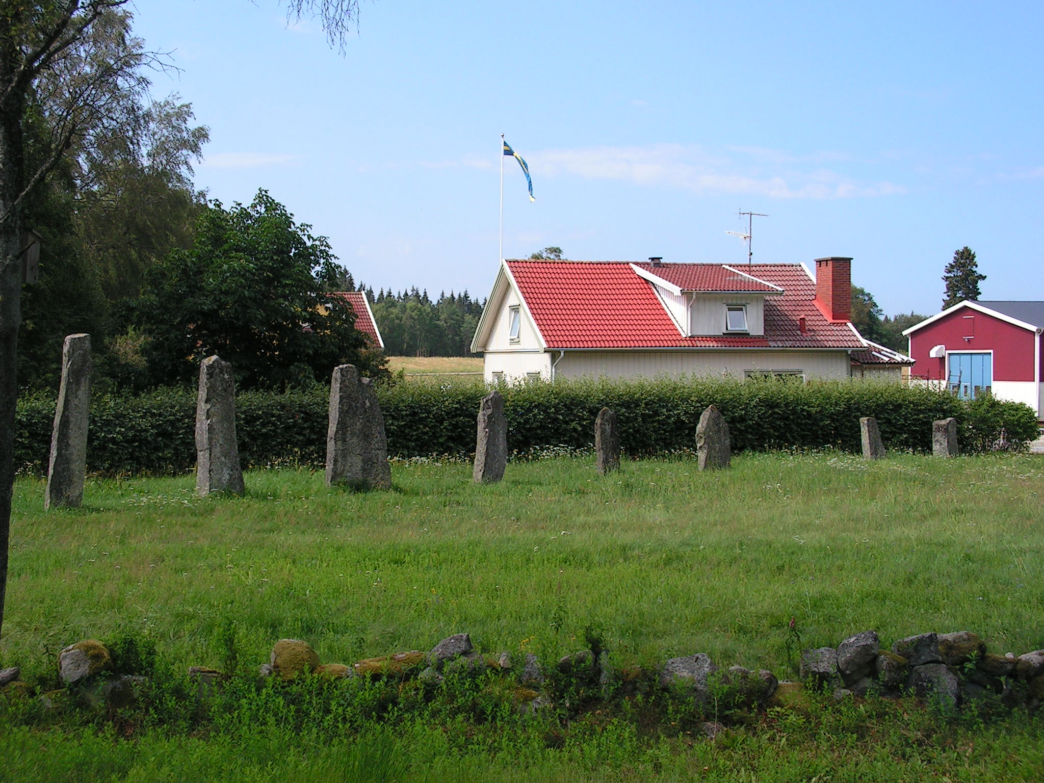 Stenehed, Munkedals kommun, Sverige